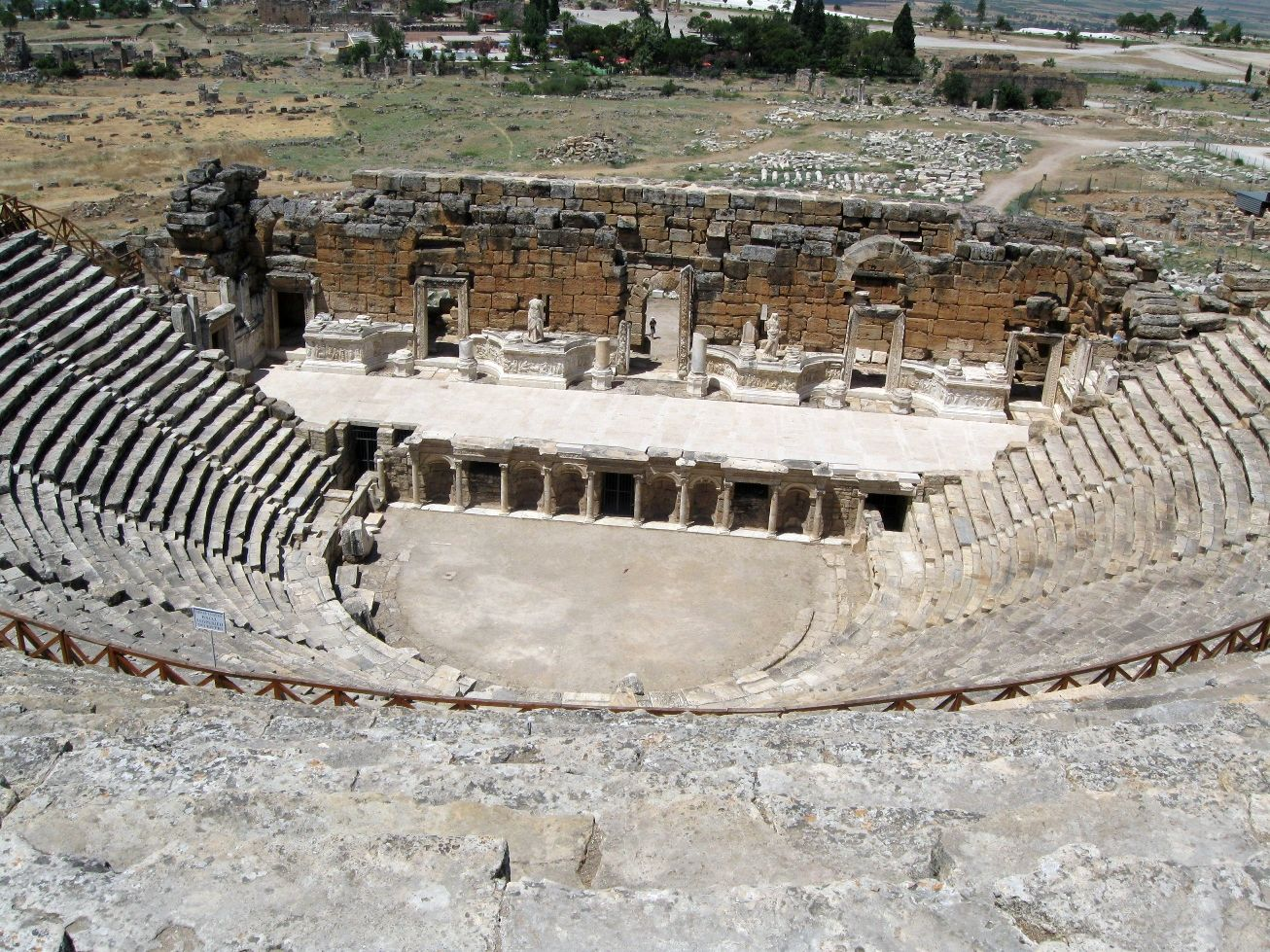 Древнегреческий театр в Хиераполисе